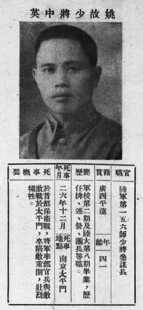 中文（台灣）: 抗戰軍人忠烈錄第一輯中的烈士遺像